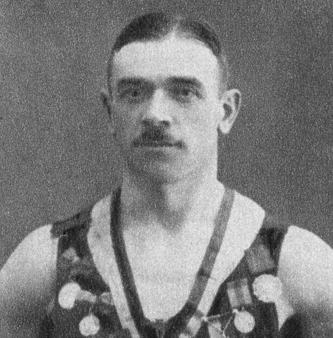 Albert Pettersson